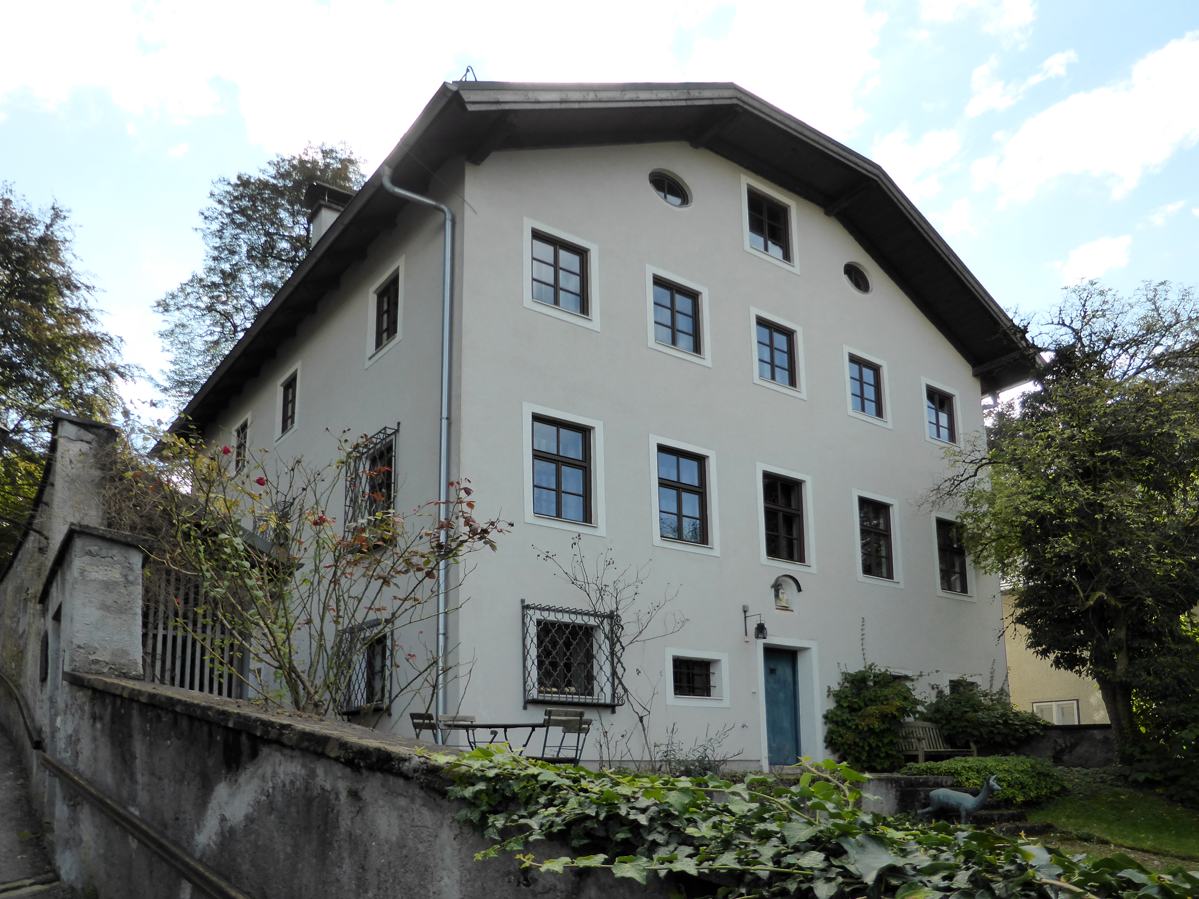 Mayerhaus am Mönchsberg, Salzburg. Ehemaliges Wohnhaus von Adele und Hermine Esinger.